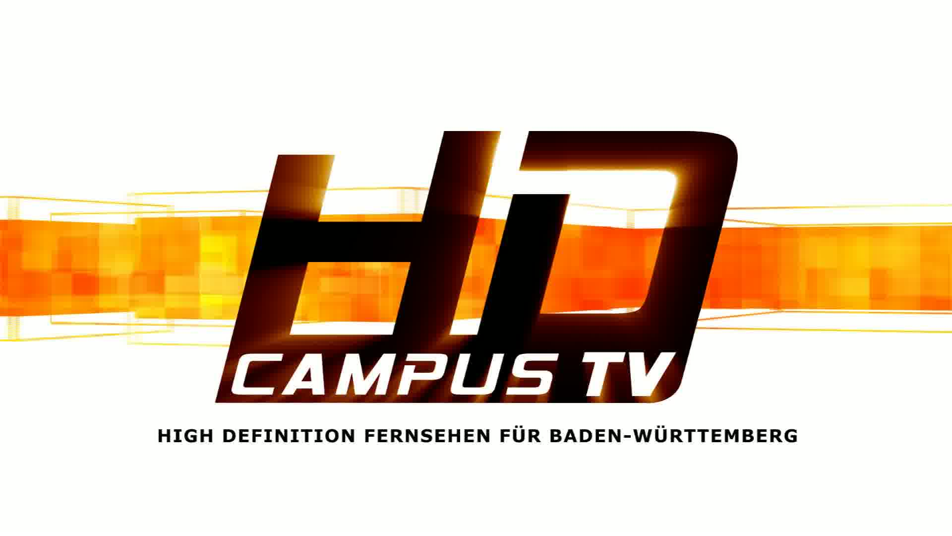 Logo des Senders HD Campus TV